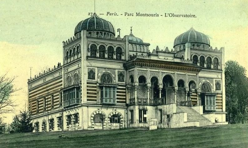 Palais du Bardo - Paris, Parc Montsouris (France) ; carte postale